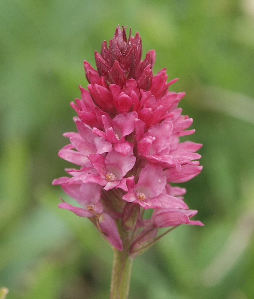 ×Gymnigritella suaveolens, Allgäuer Alpen, Germany